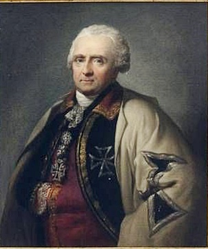 Heinrich Moritz von Berlepsch (1736-1809), Deutschordensritter, letzter Landkomtur von Thüringen.